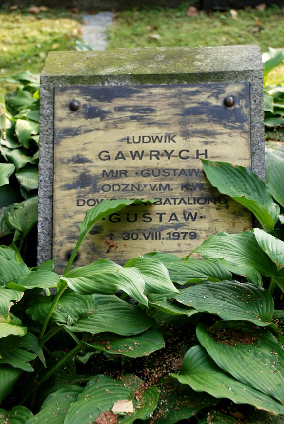 Warszawa, Powązki. Grób Ludwika Gawrycha